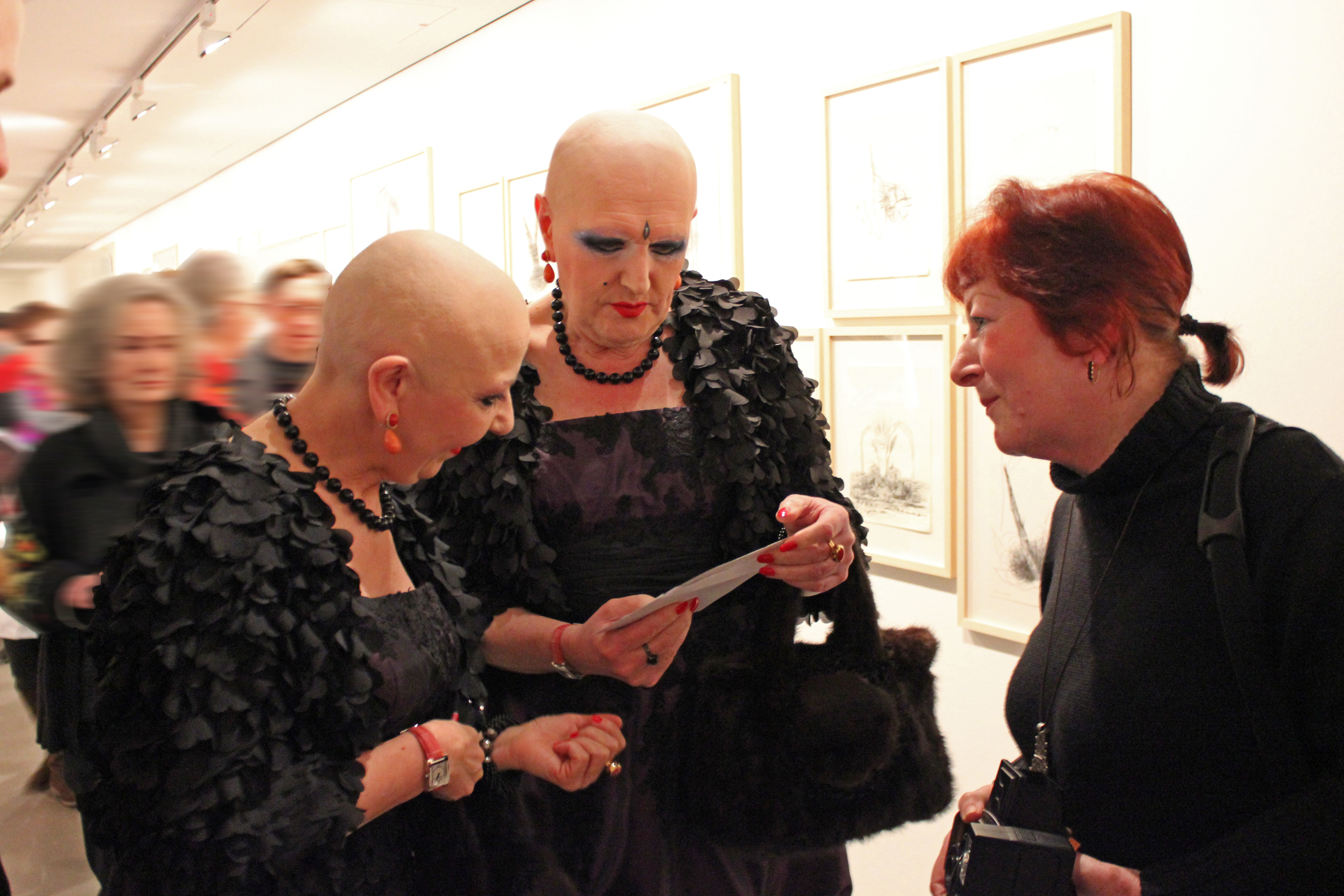 Das lebende Kunstpaar Eva und Adele (Berlin) bei der Eröffnung ihrer Ausstellung "Futuring" im MARTa Herford am 10.03.2013.